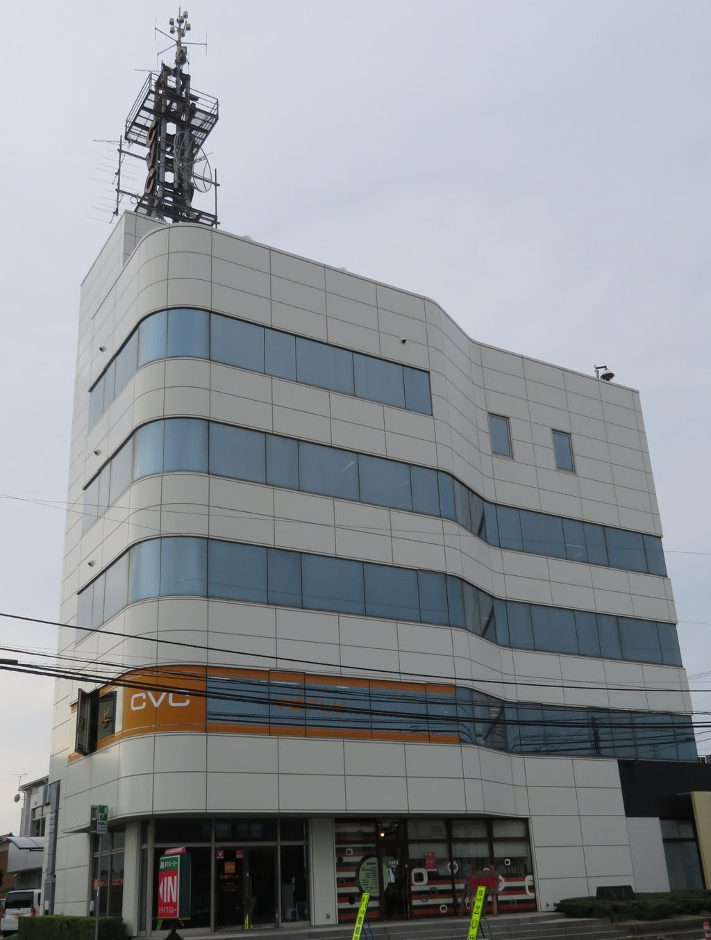 中讃ケーブルテレビ